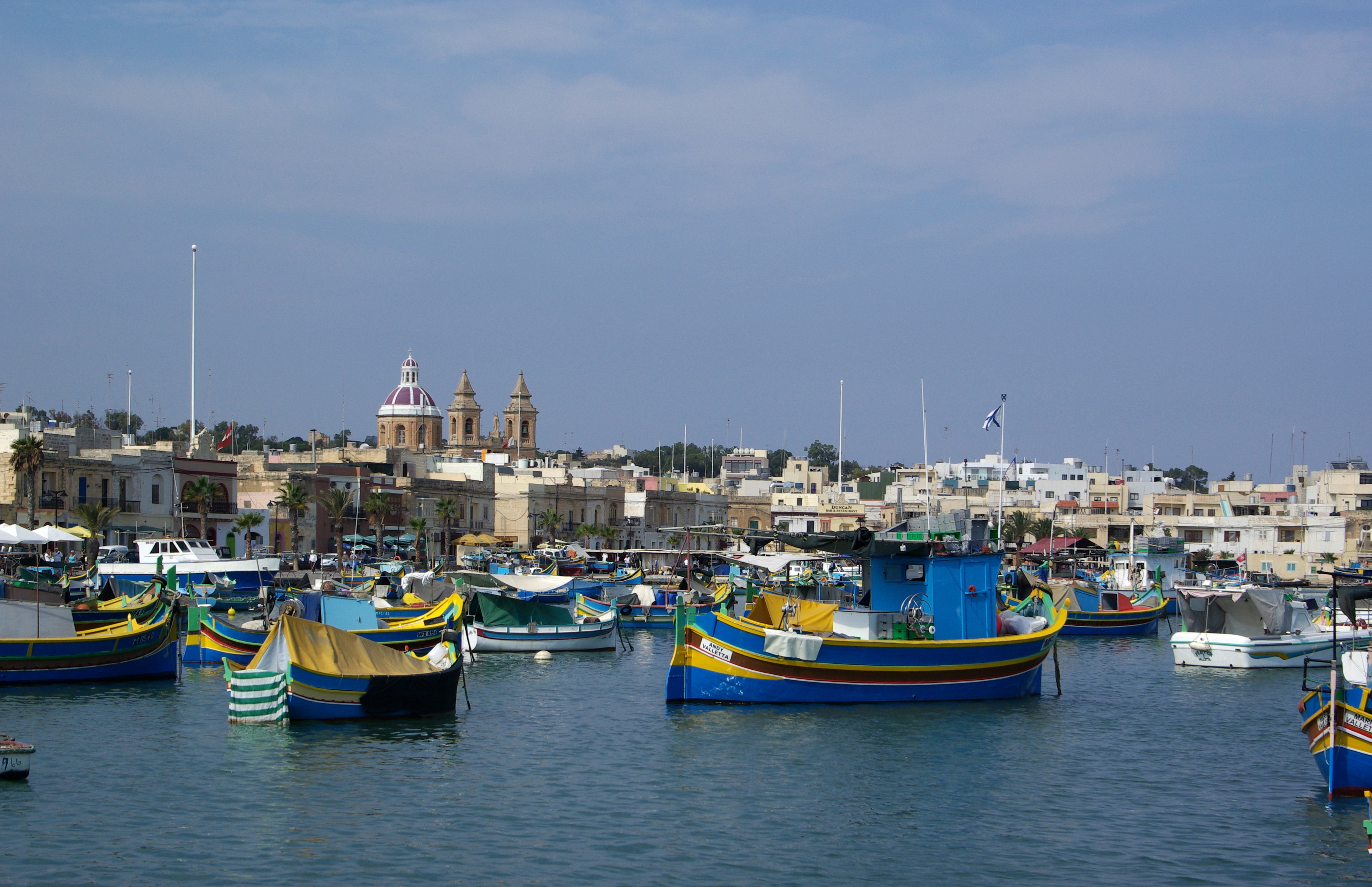 Malta, Marsaxlokk, Hafen